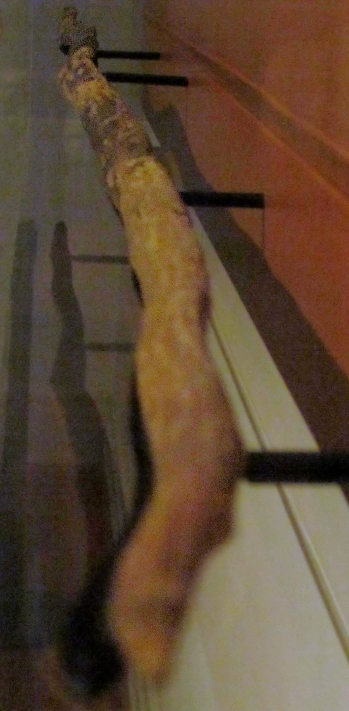 Schöniger Speer in der Ausstellung "Bewegte Zeiten. Archäologie in Deutschland" in Berlin